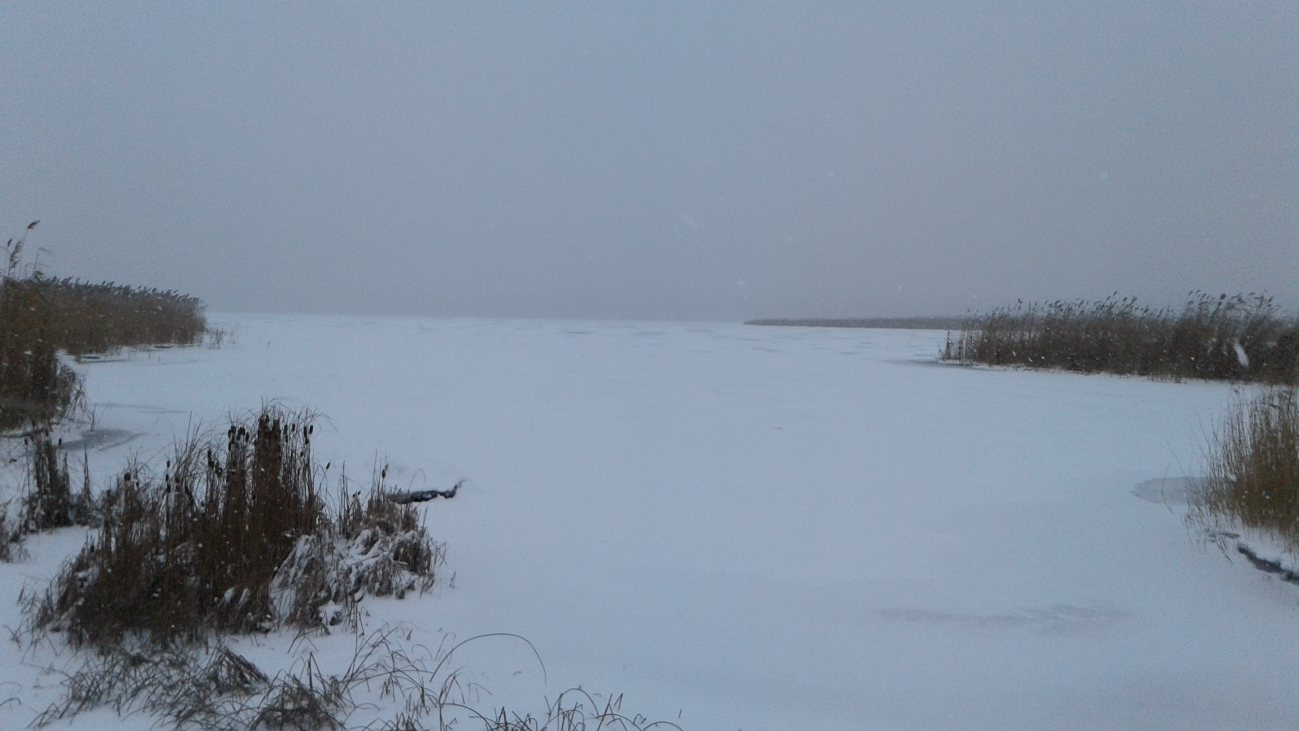 Буг взимку - 2 км завширшки